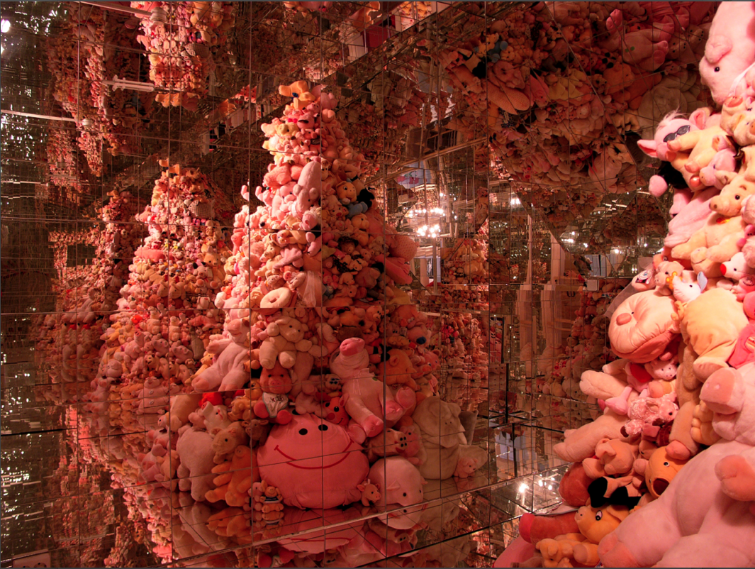 schweinehaufen